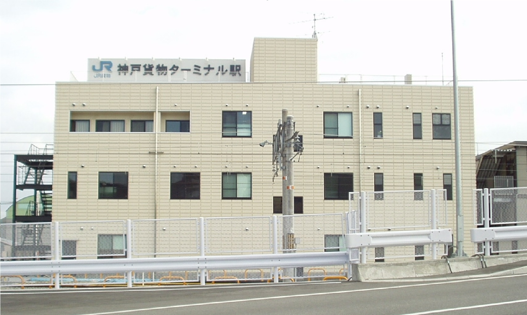 神戸貨物ターミナル駅舎全景。